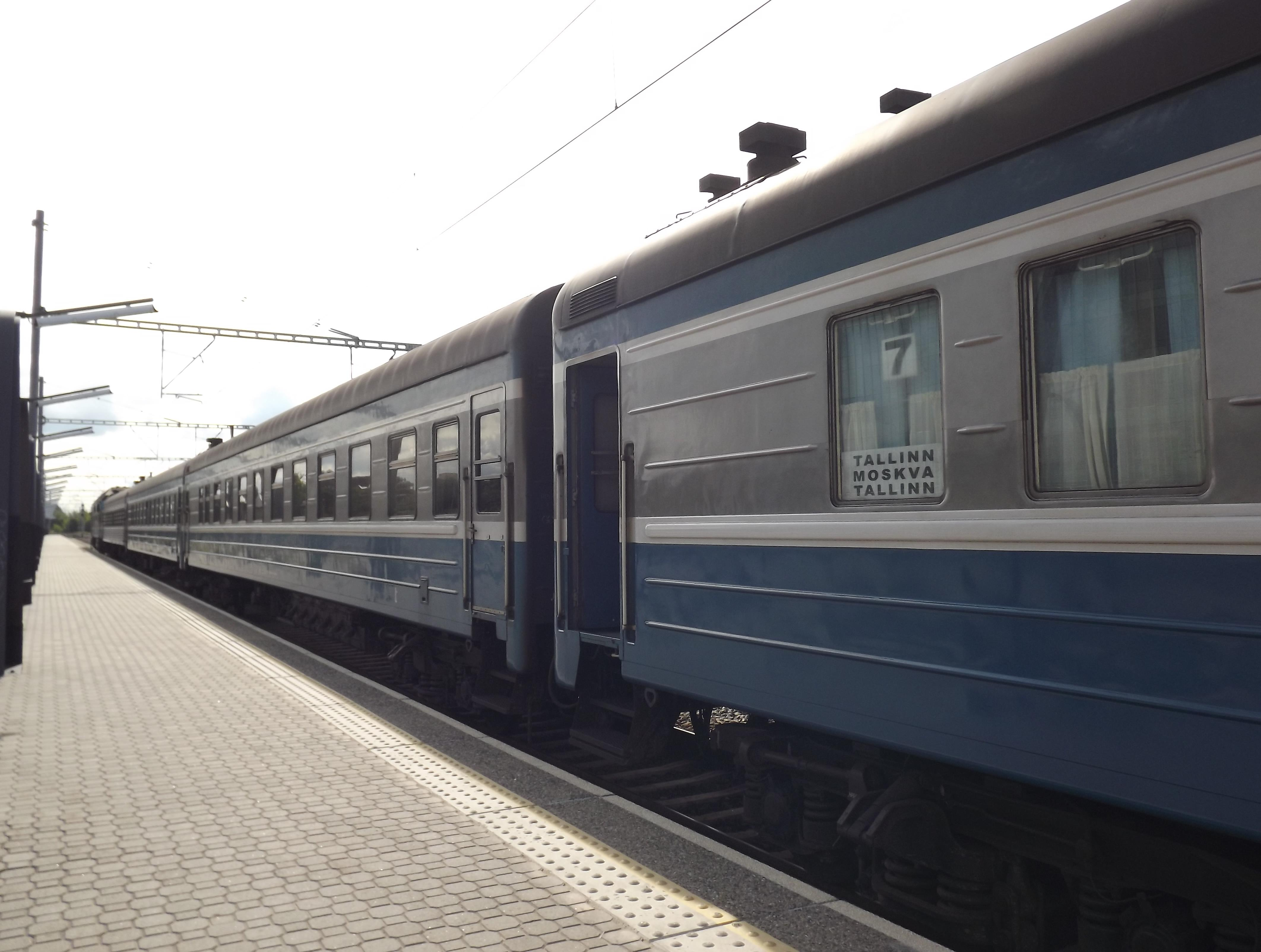 Tallinna-Moskva reisirong Balti jaamas, vasakul mootorvedur TEP70